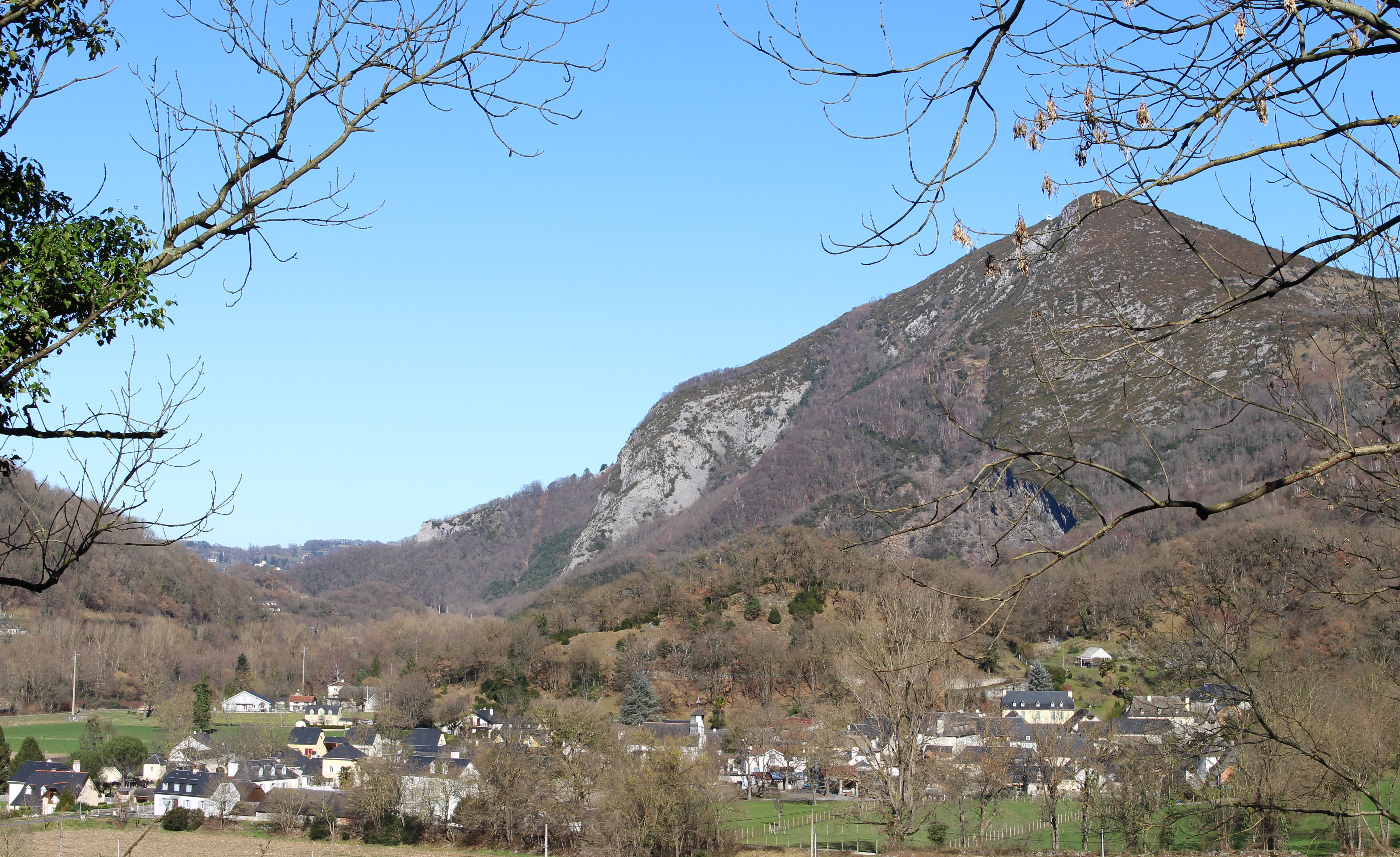 Ger (Hautes-Pyrénées)